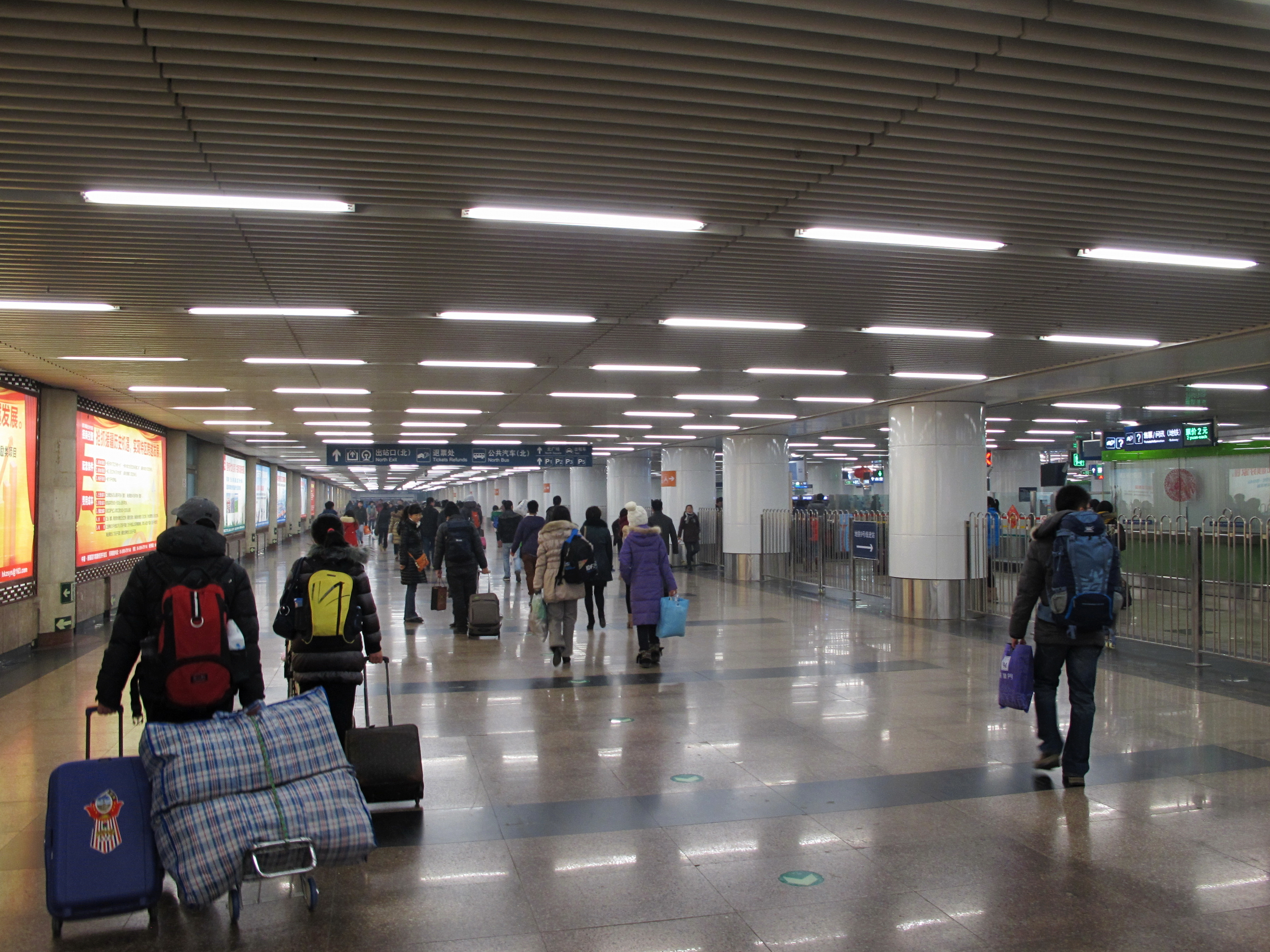 中文（中国大陆）: 北京西客站的南、北出站口之间的地下通道